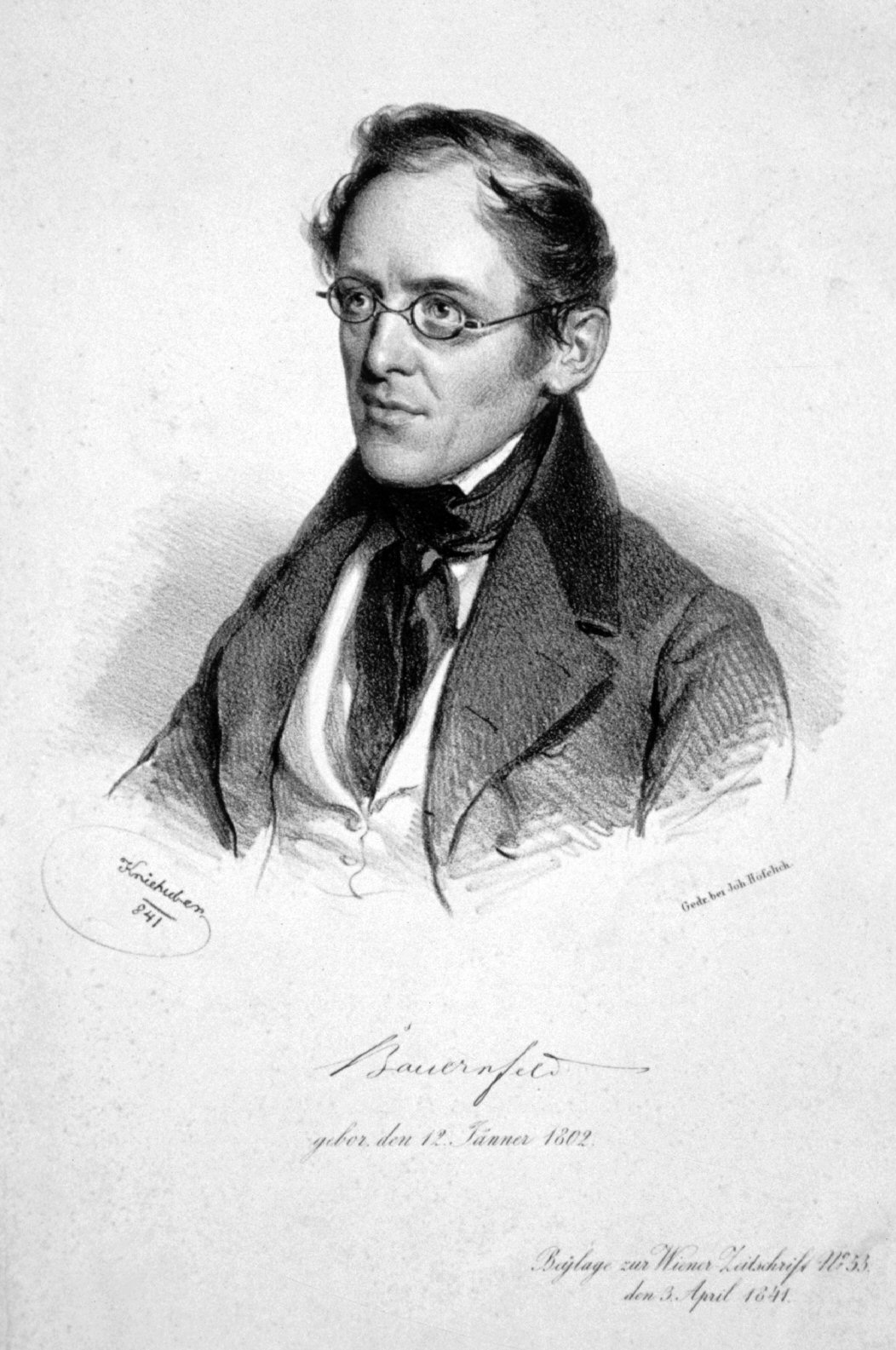 Eduard von Bauernfeld (1802-1890), österreichischer Schriftsteller